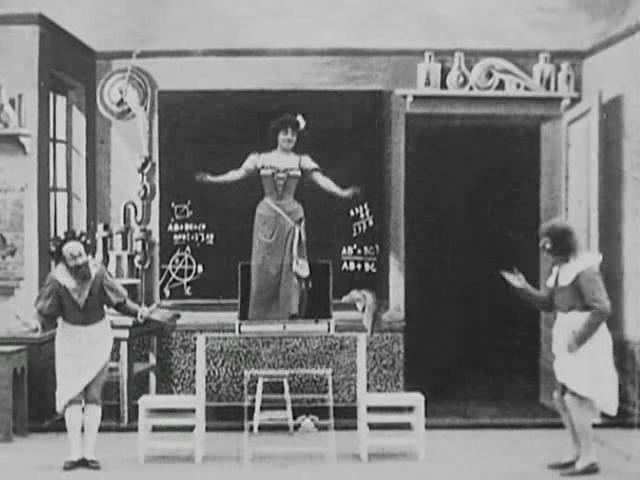 photo du film "La boîte à malice" (Méliès, 1903)